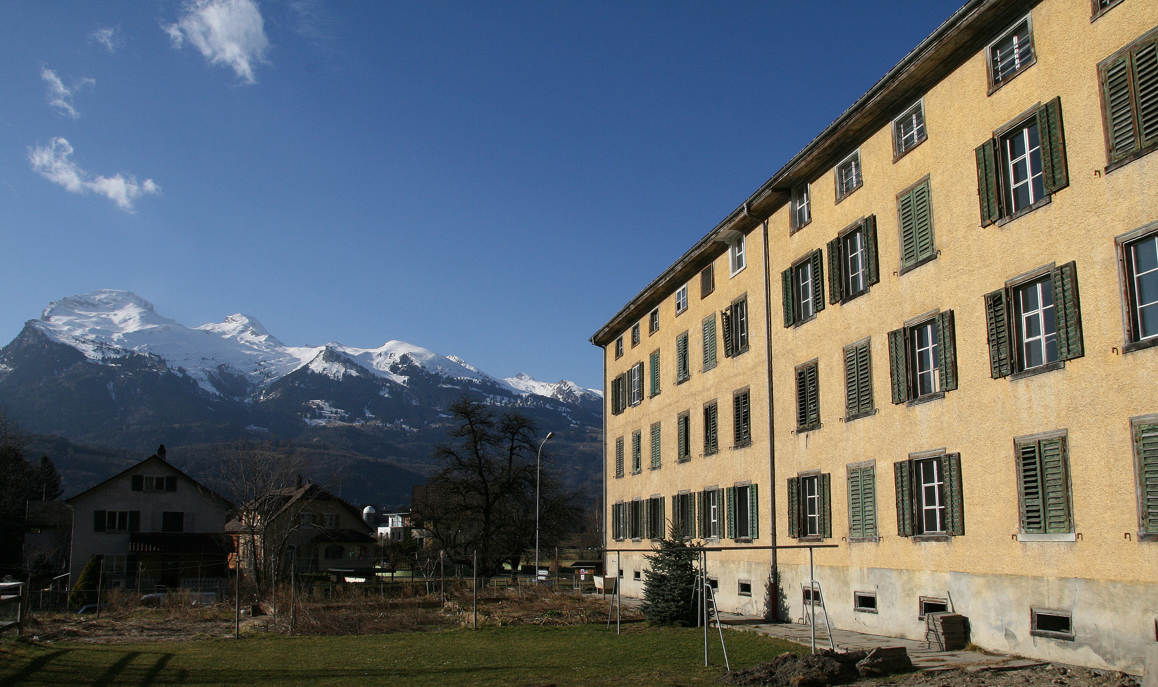 Kosthaus (Arbeiterwohnhaus) von Architekt Hilarius Knobel erbaut vom Baumwollfabrikant Caspar Jenny 1873 in Triesen, Liechtenstein. Derzeit wird geprüft, ob das Gebäude renoviert werden kann.